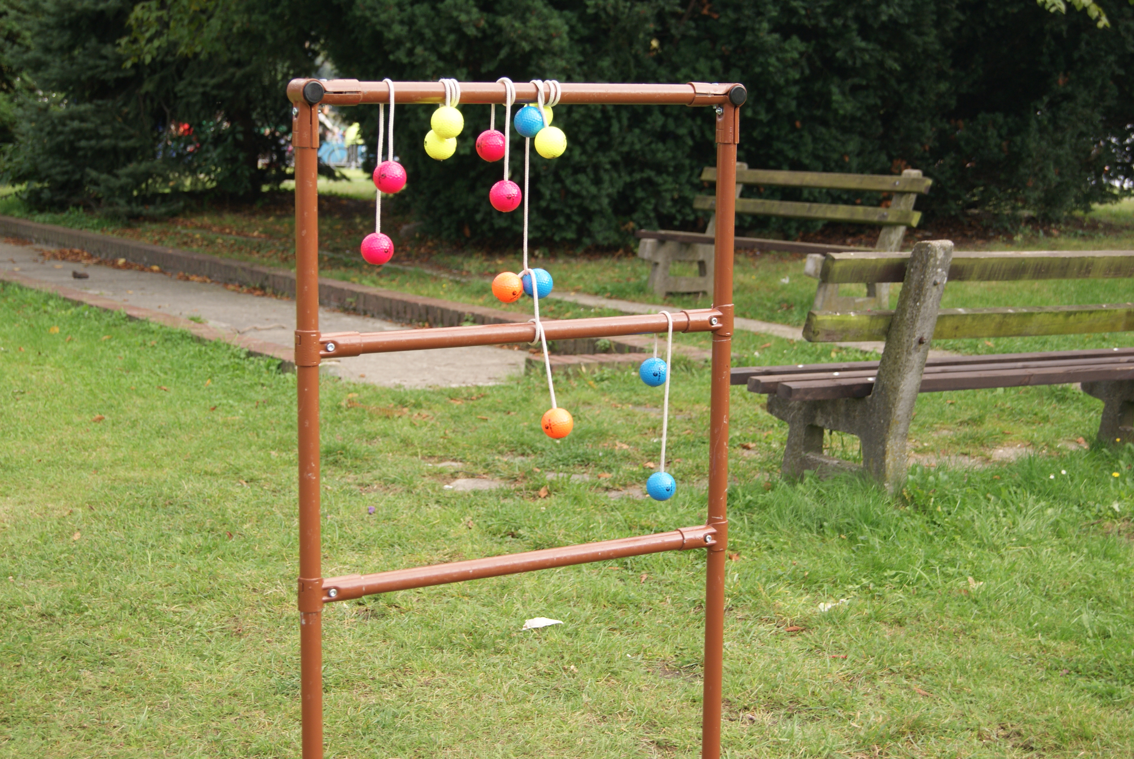 Splątane bola 1